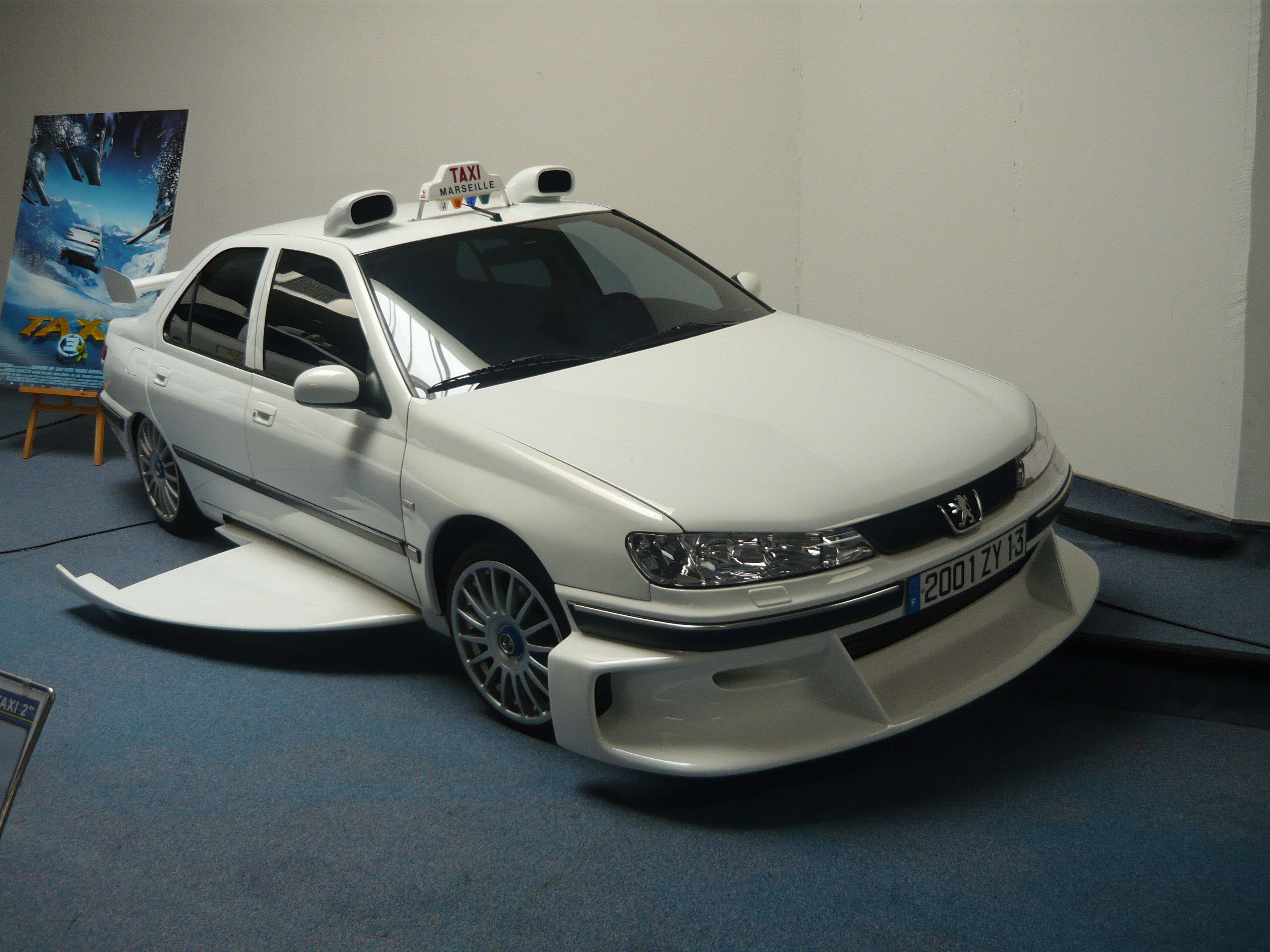 Peugeot 406 du film Taxi